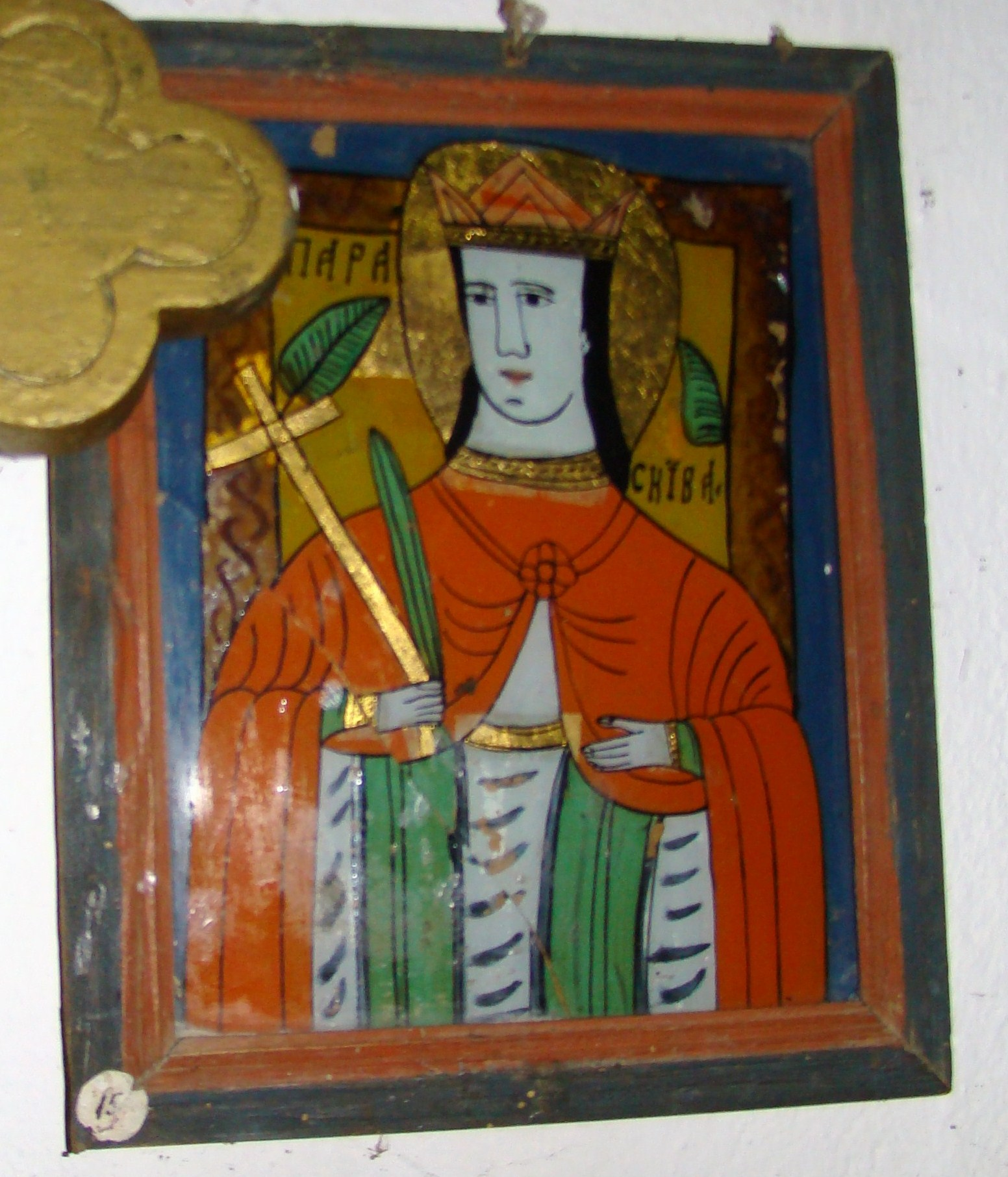 Icoană din Muzeul Parohiei Homorog, județul Bihor